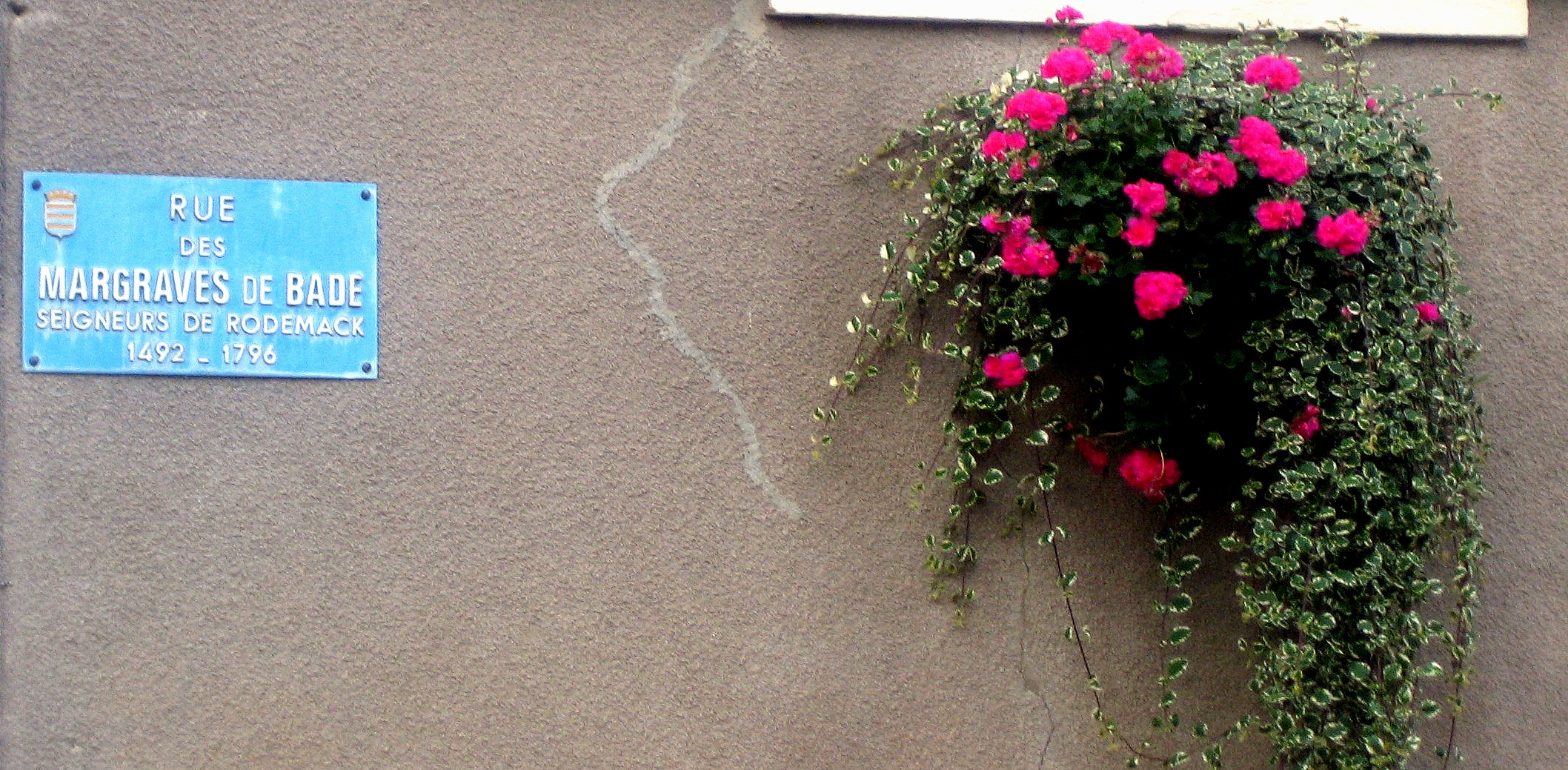 Strassenschild in Rodemack zur Erinnerung an die Herrschaft der Markgrafen von Baden